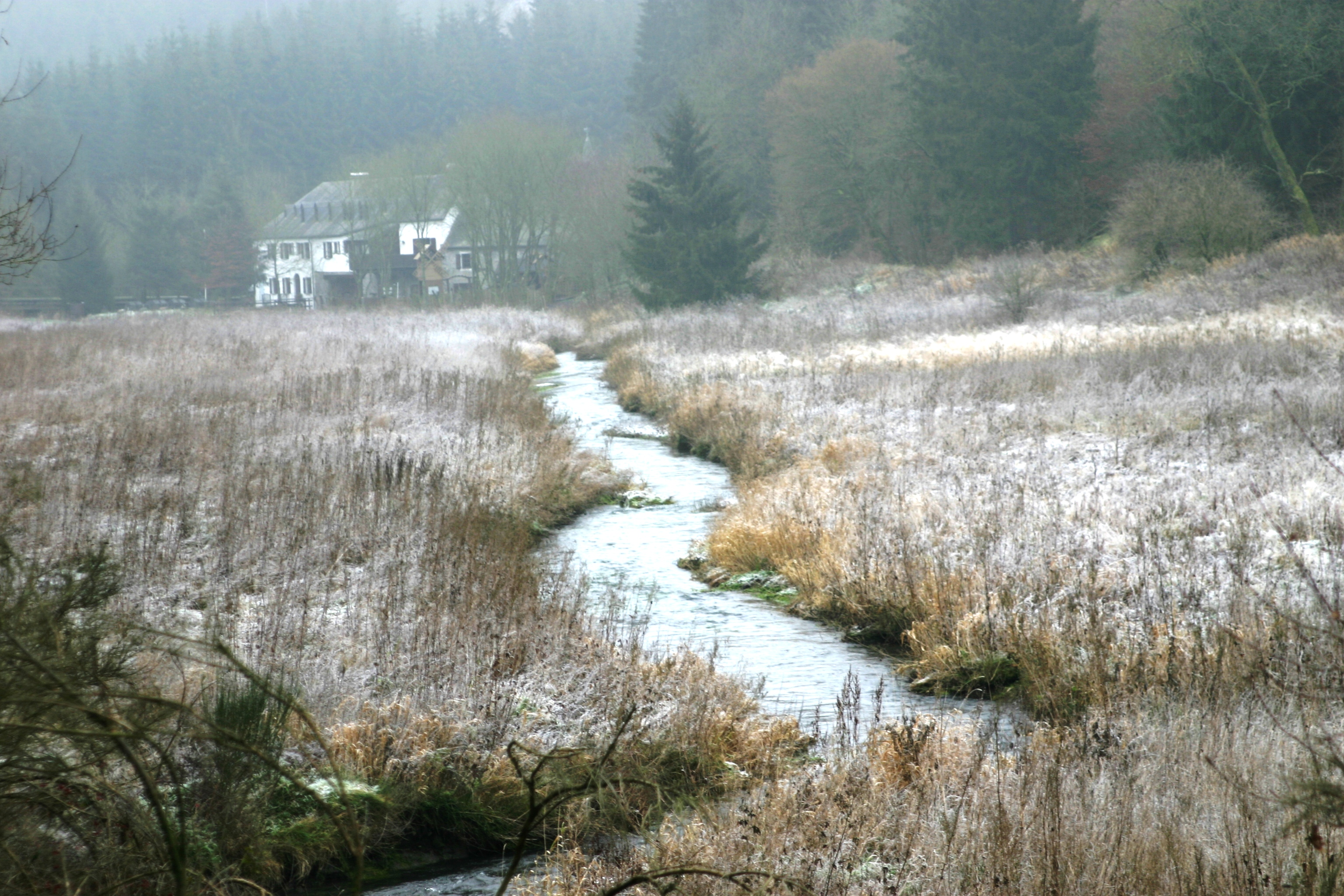 Trëttenerbach bei der Aasselbuerer Millen.